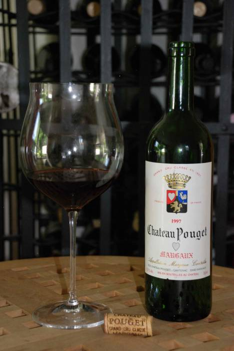 1997 Chateau Pouget Margaux